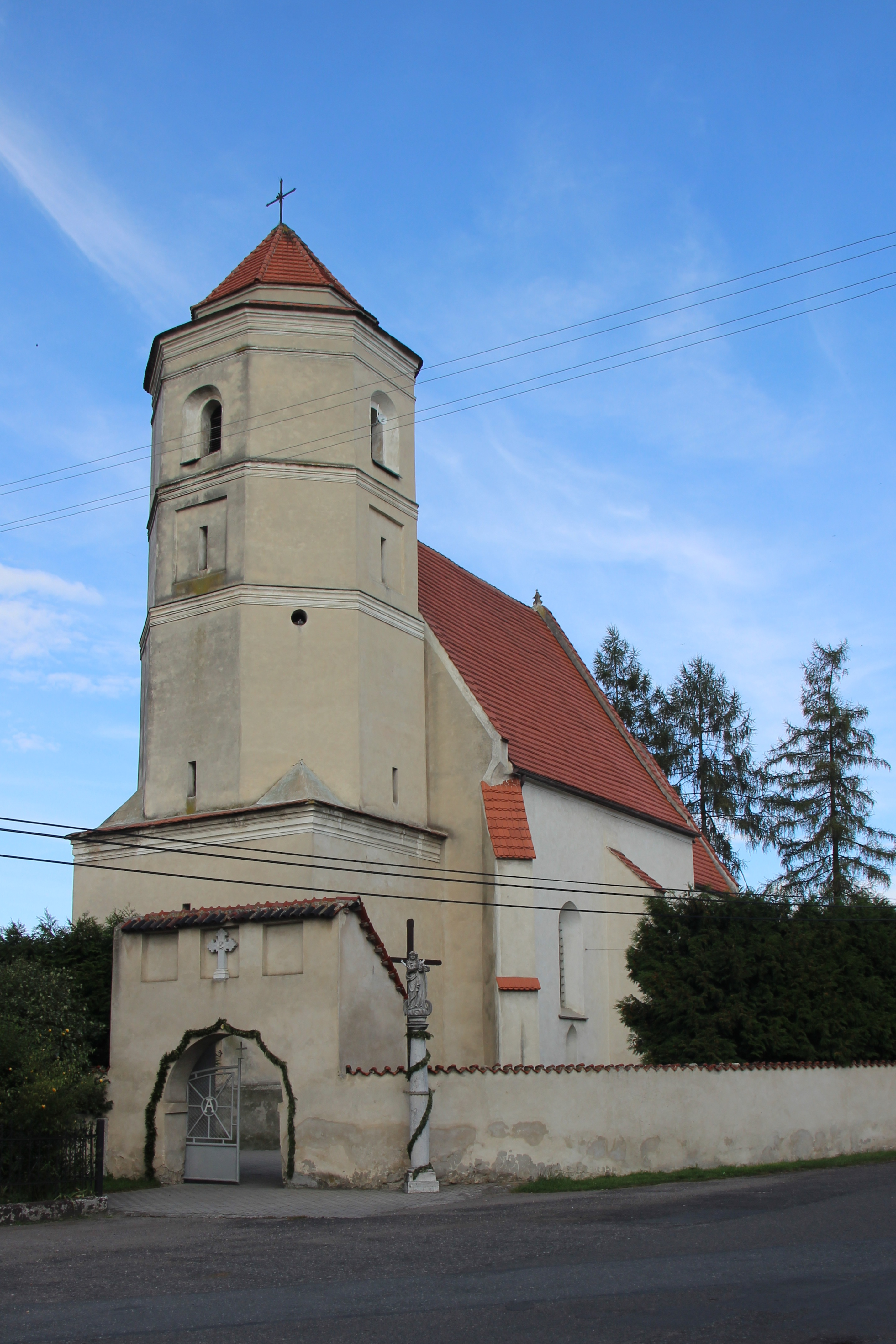 Radzikowice – wieś w Polsce położona w województwie opolskim, w powiecie nyskim, w gminie Nysa.